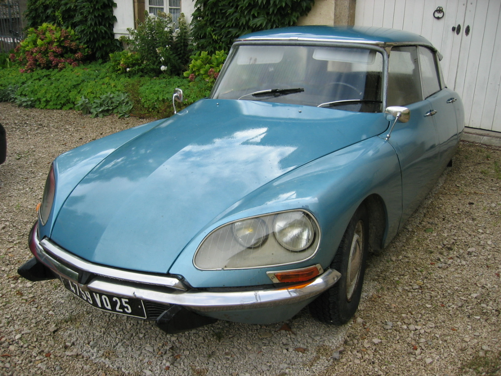 Citroën DS